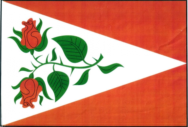 vlajka, Třebětice, okres Kroměříž